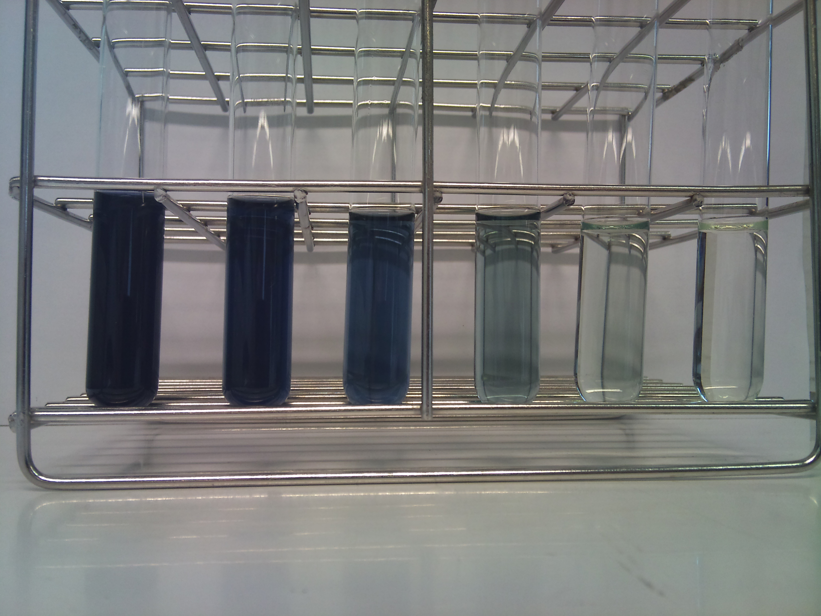 Photographie d'une gamme étalon de la tyrosine